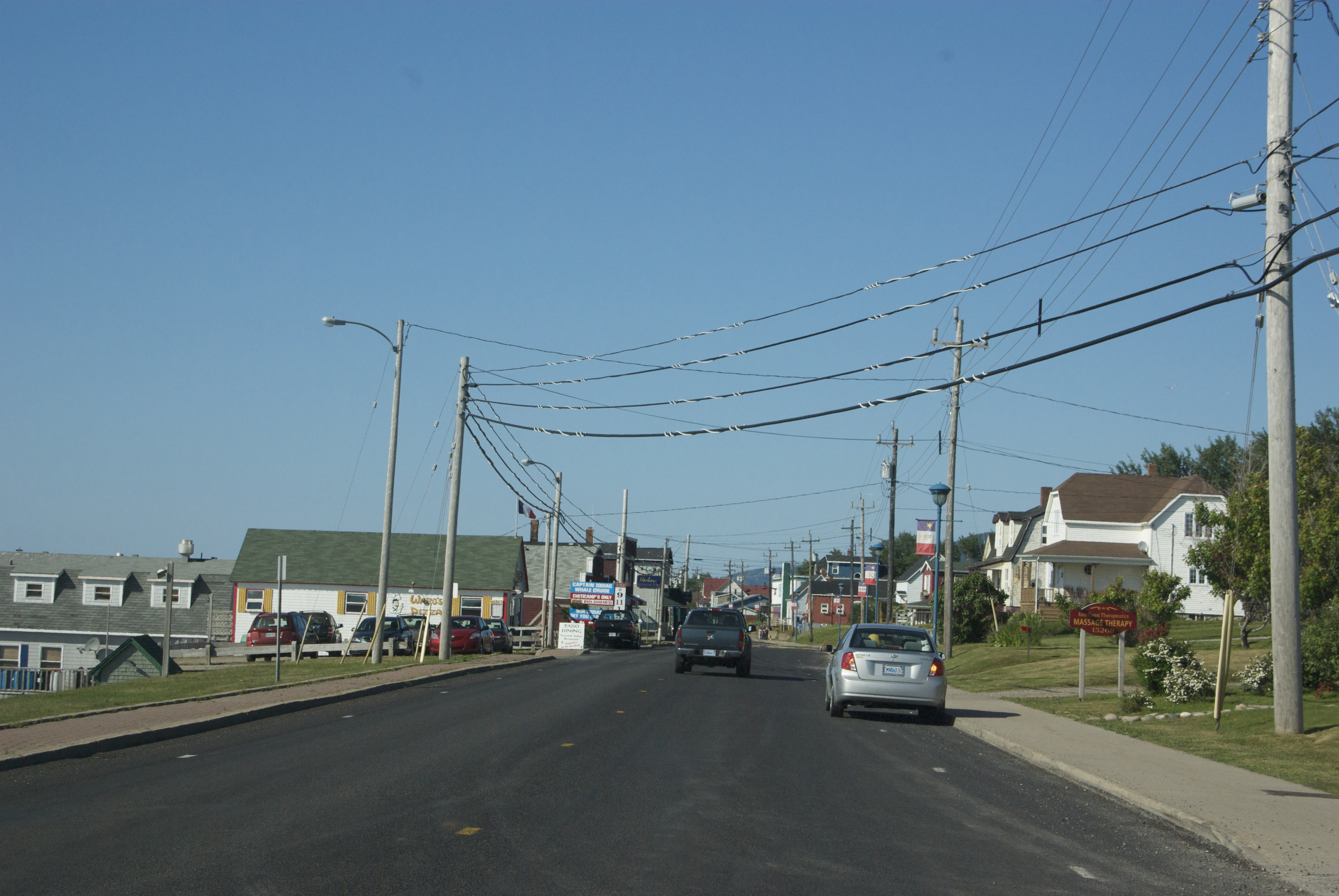 Cape Breton